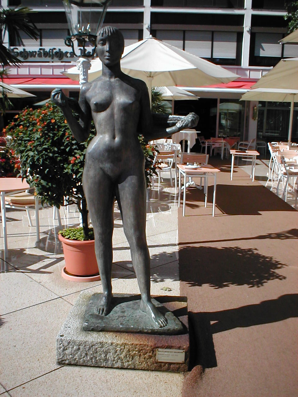 Skulptur "Schwimmerin" von Waldemar Grzimek, auf der Friedrich-Ebert-Brücke vor dem Insel-Hotel in Heilbronn.